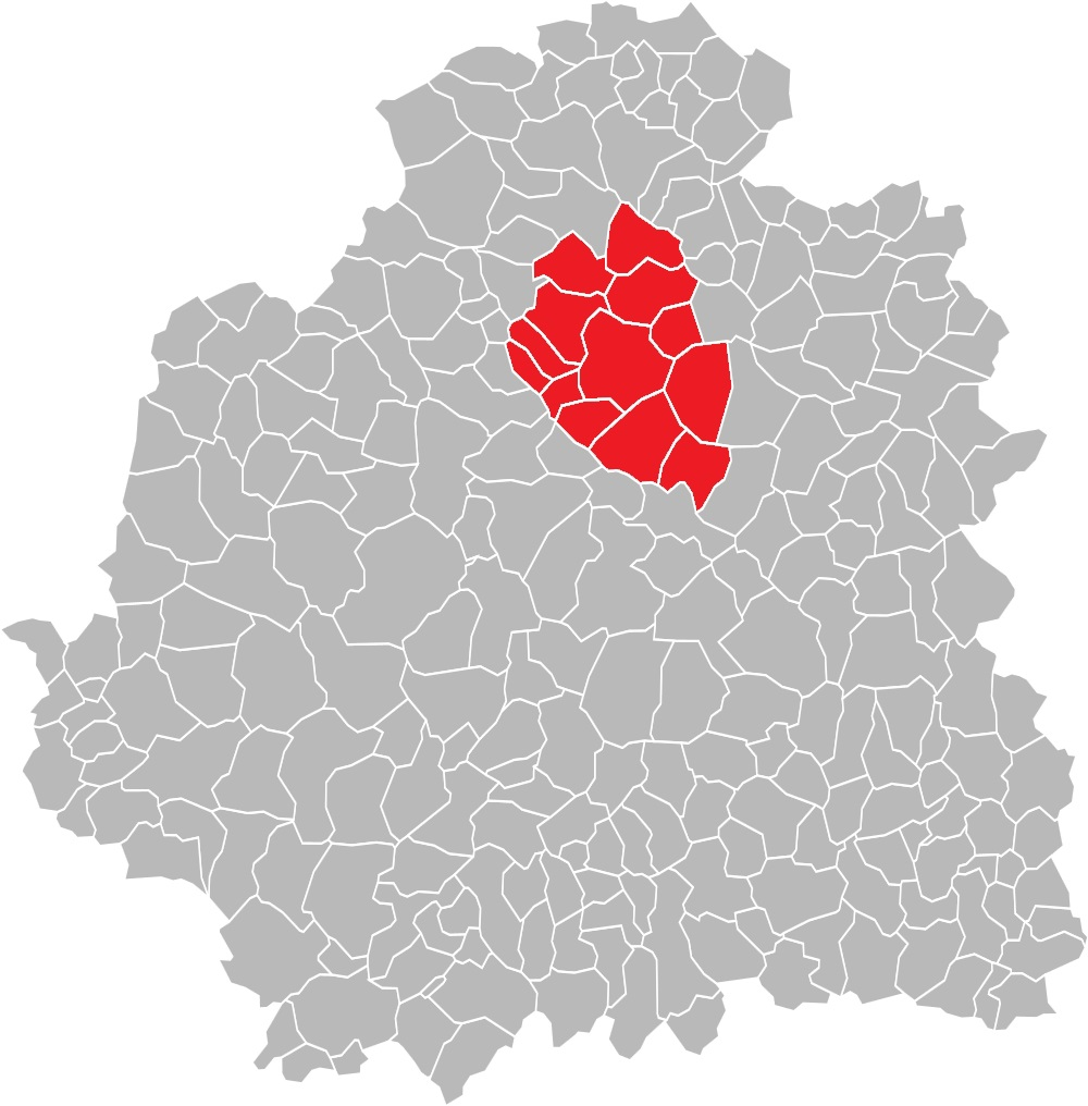 Carte des communes de l'Indre (36) : Le canton de Levroux, de 1790 à 2015.